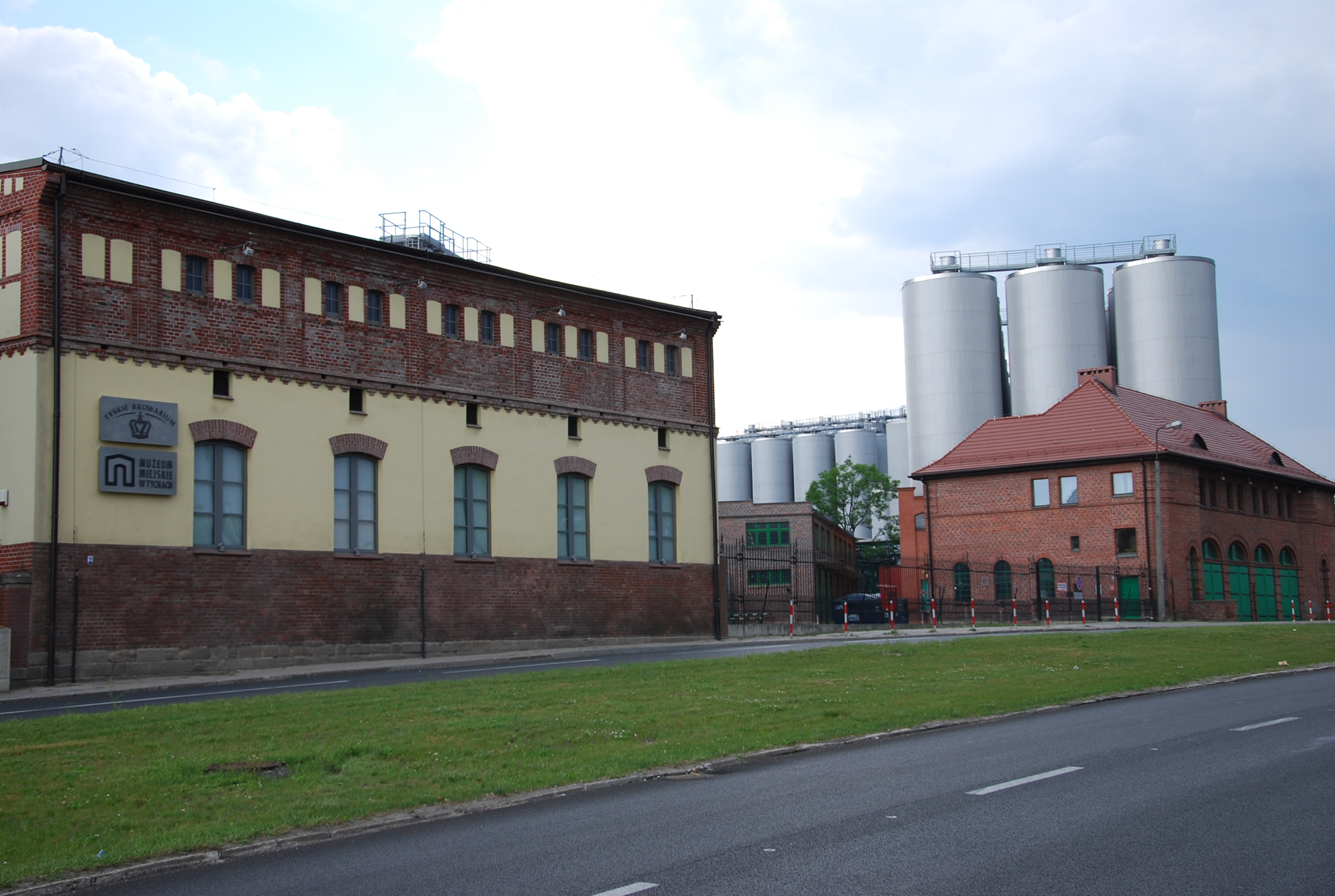 Tyskie Browary Książęce